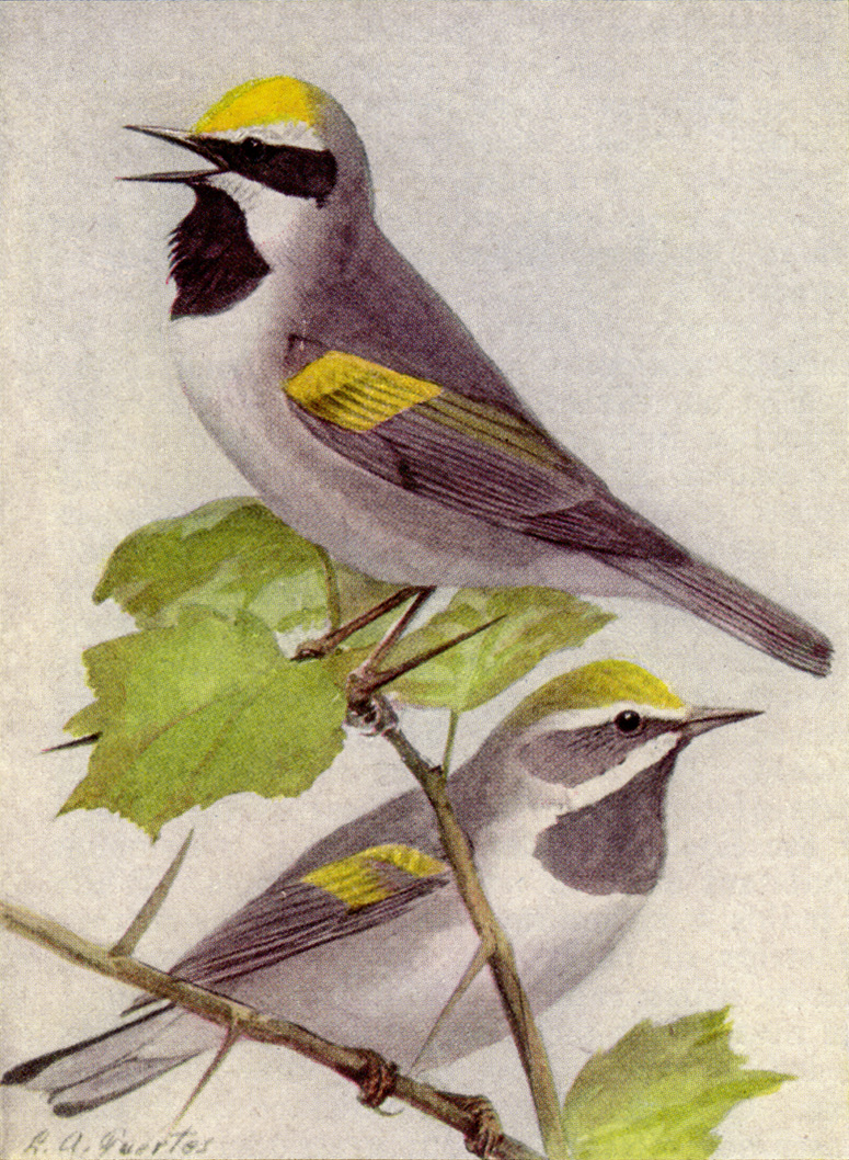 Golden-winged Warbler Male and Female (Vermivora chrysoptera).